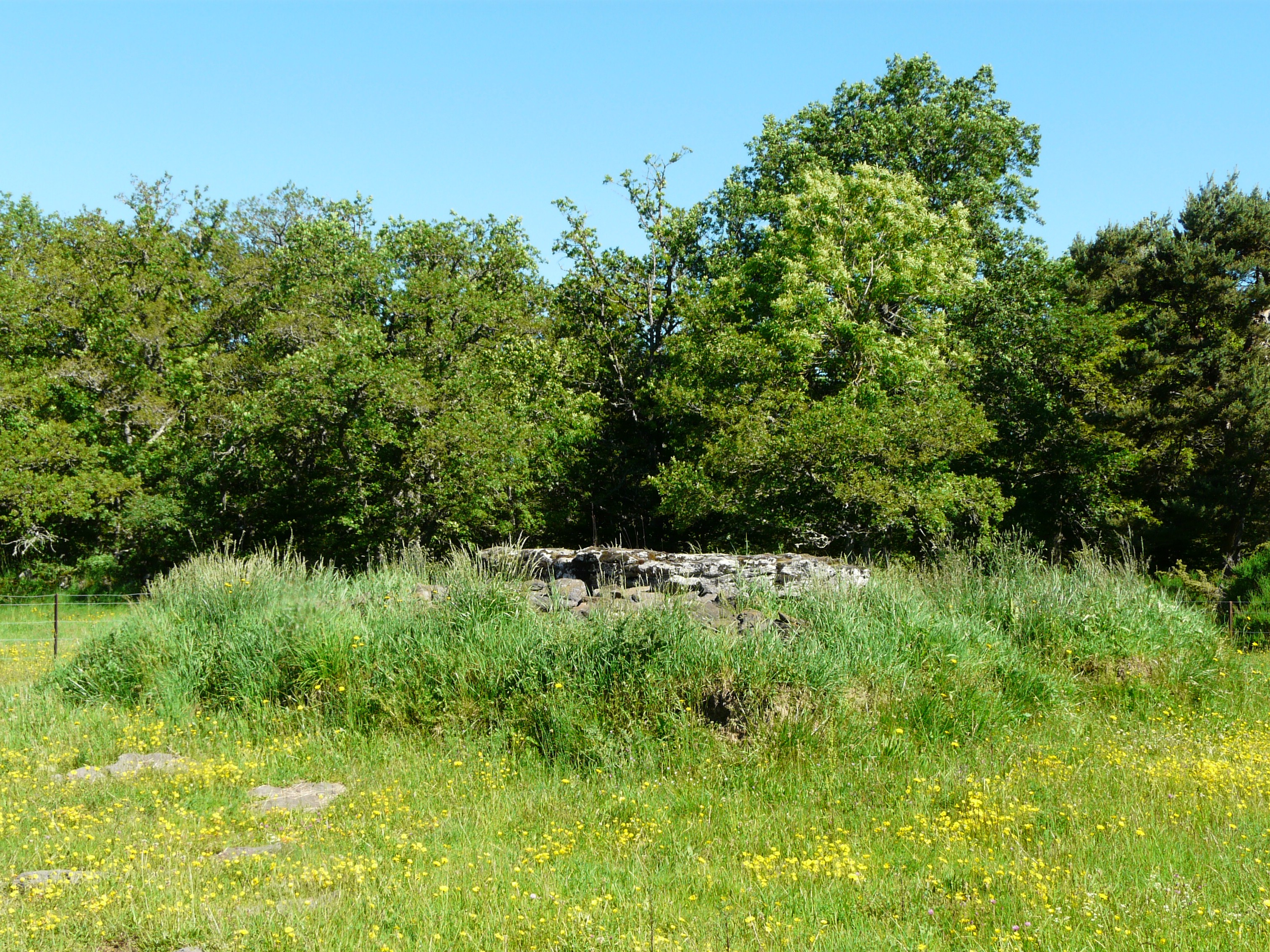 Le dolmen de la Table au Loup, enfoui dans un tumulus, Sériers, Cantal, France.